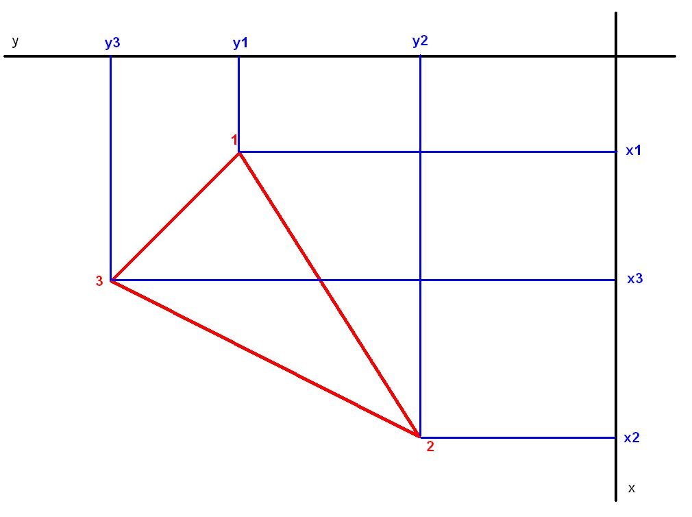 Výpočet plochy pomocí L´Huillierových vzorců - Zobrazení souřadnic